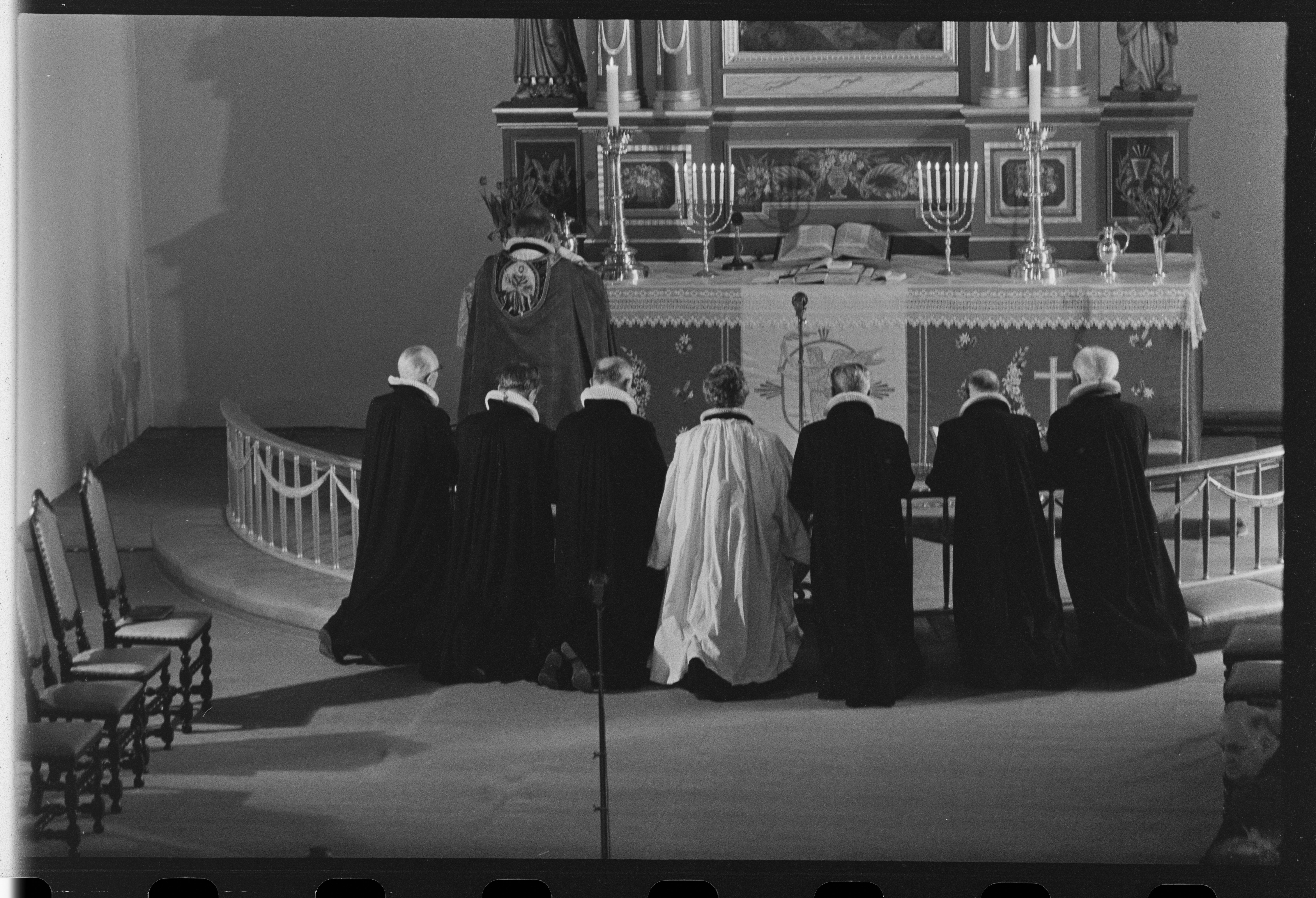 Bildet er hentet fra Arkivverket. Ingrid Bjerkås, ordinasjon i Vang kirke. Biskop Harald Schjelderup. NÅ nr. 12, 1961. Arkivinstitusjon : Riksarkivet Arkivnavn : Billedbladet NÅ Sted : Norge, Oppland, Vang, Emneord: Prester, Biskoper, Kirker, Interiør, Ordinasjon, Kvinnelige prester Avbildet